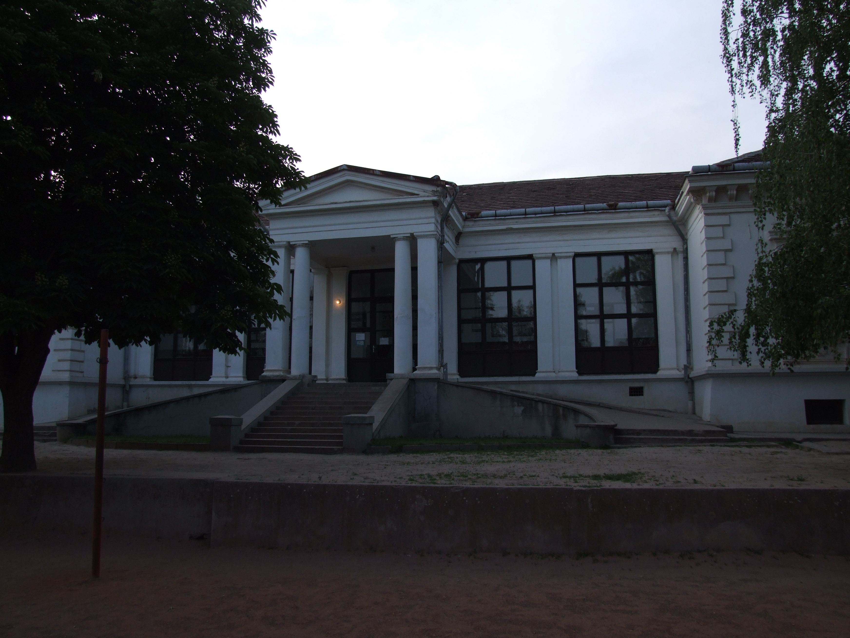 Daróczy-kúria, Paks